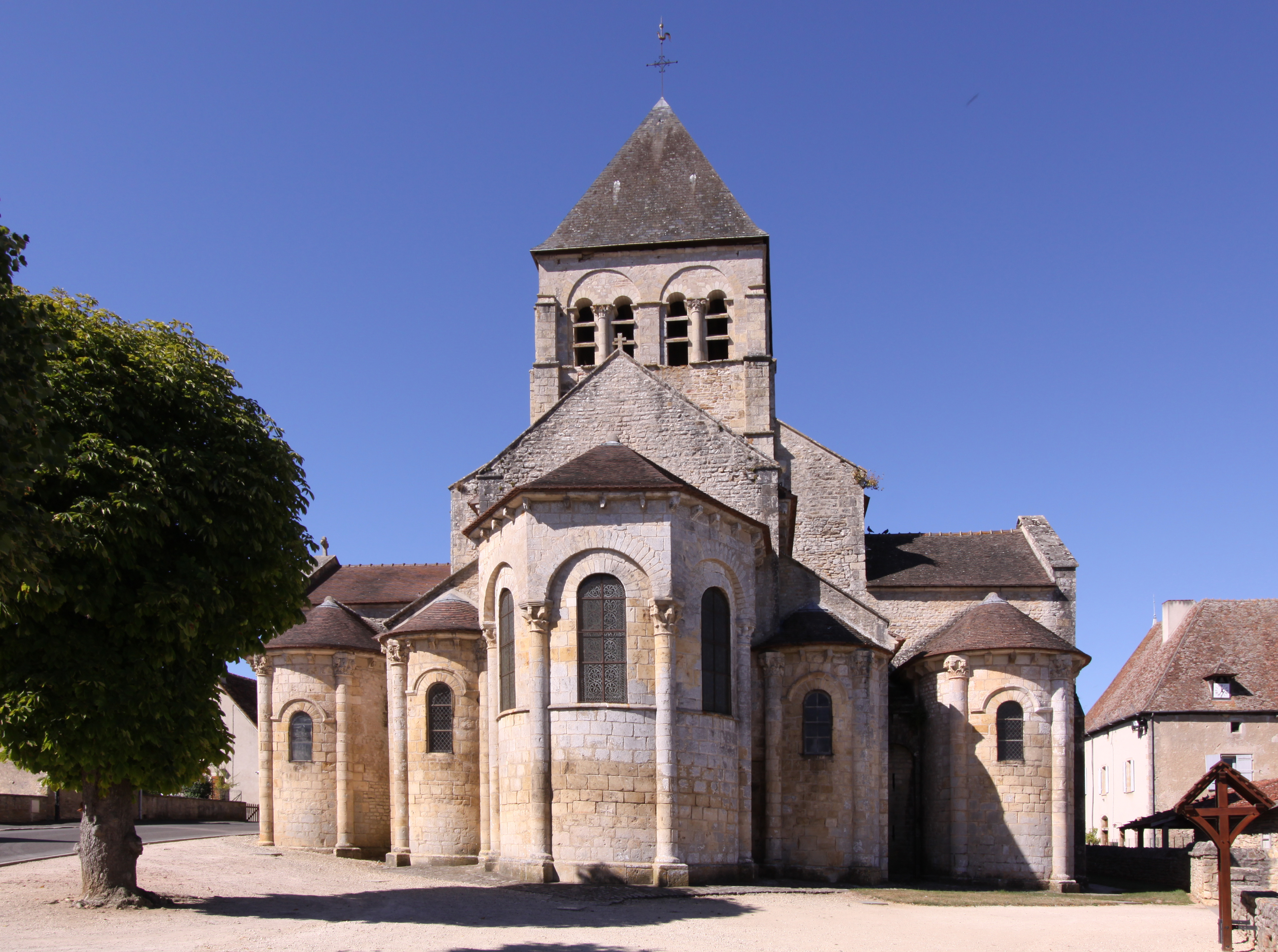 Kirche Saint-Blaise in der Ortschaft La Celle im französischen Département Cher - Chorseite